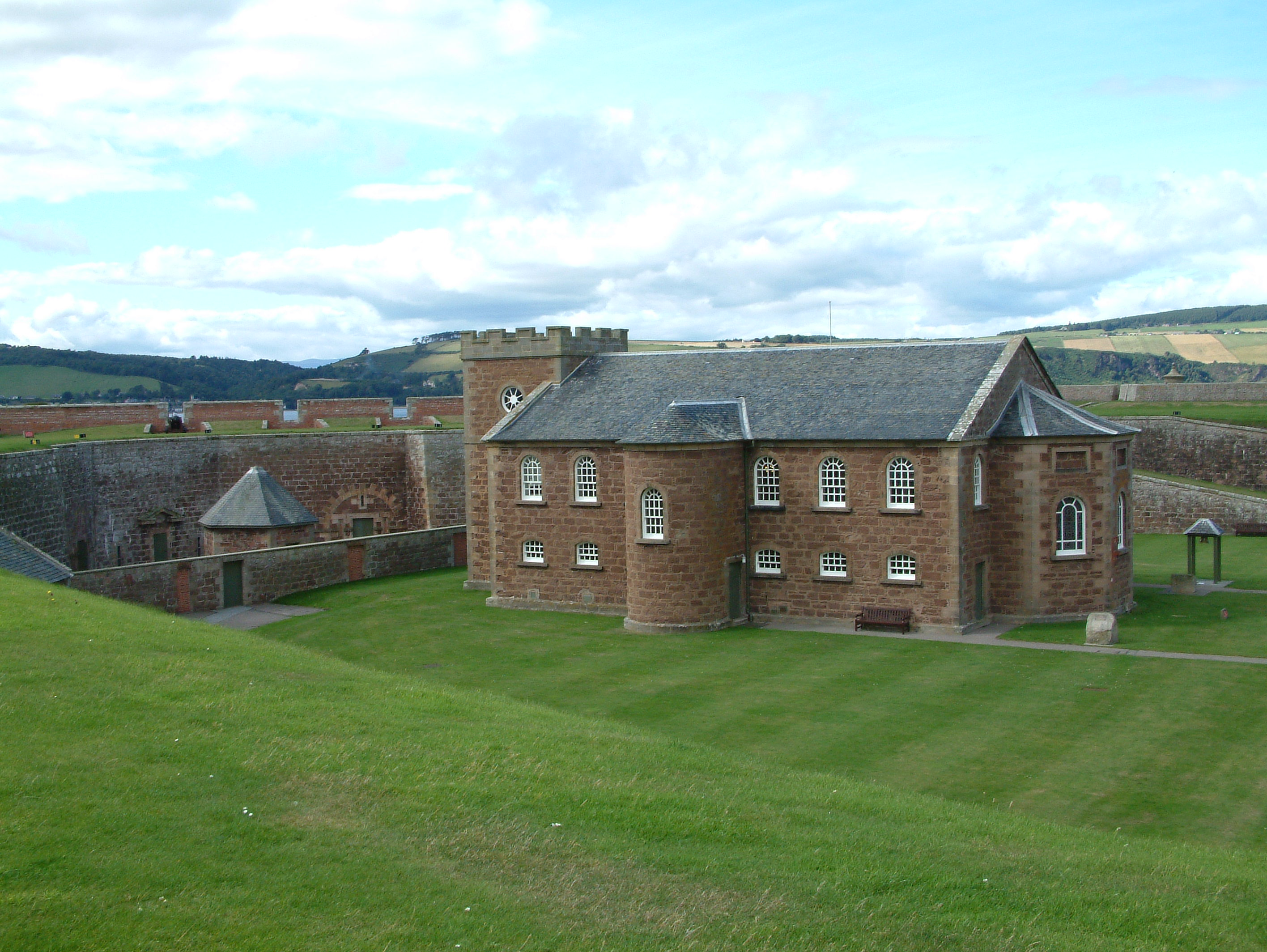 Pohled na kostel ve Fort George.